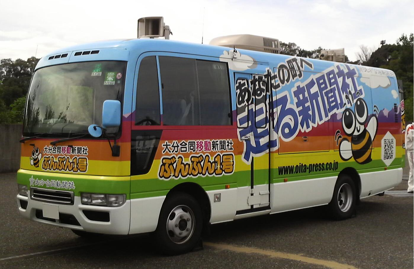 大分スポーツ公園（九州石油ドーム）で撮影した、大分合同新聞の新聞発行自動車の「ぶんぶん1号」。投稿者が撮影。ナンバープレートを加工。